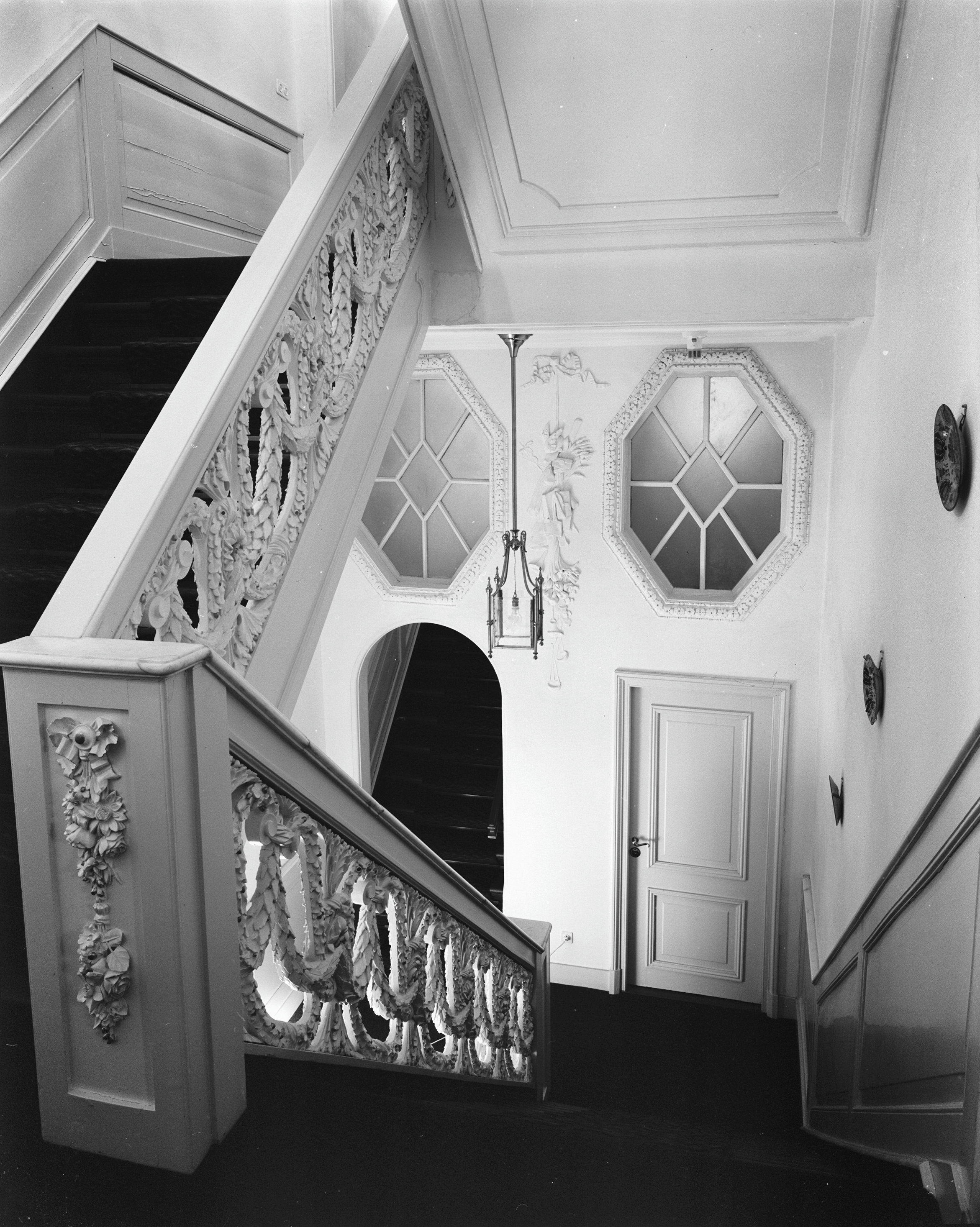 interieur trappenhuis